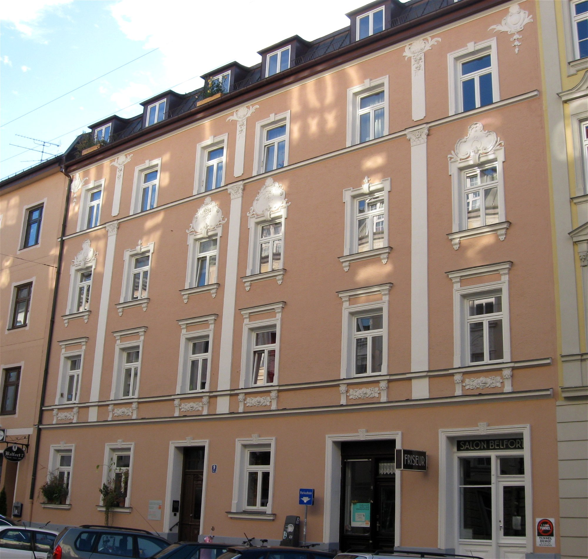 Belfortstraße 9; Mietshaus, Neurenaissance, mit zierlichem, barockisierendem Stuck, 1890/1900.